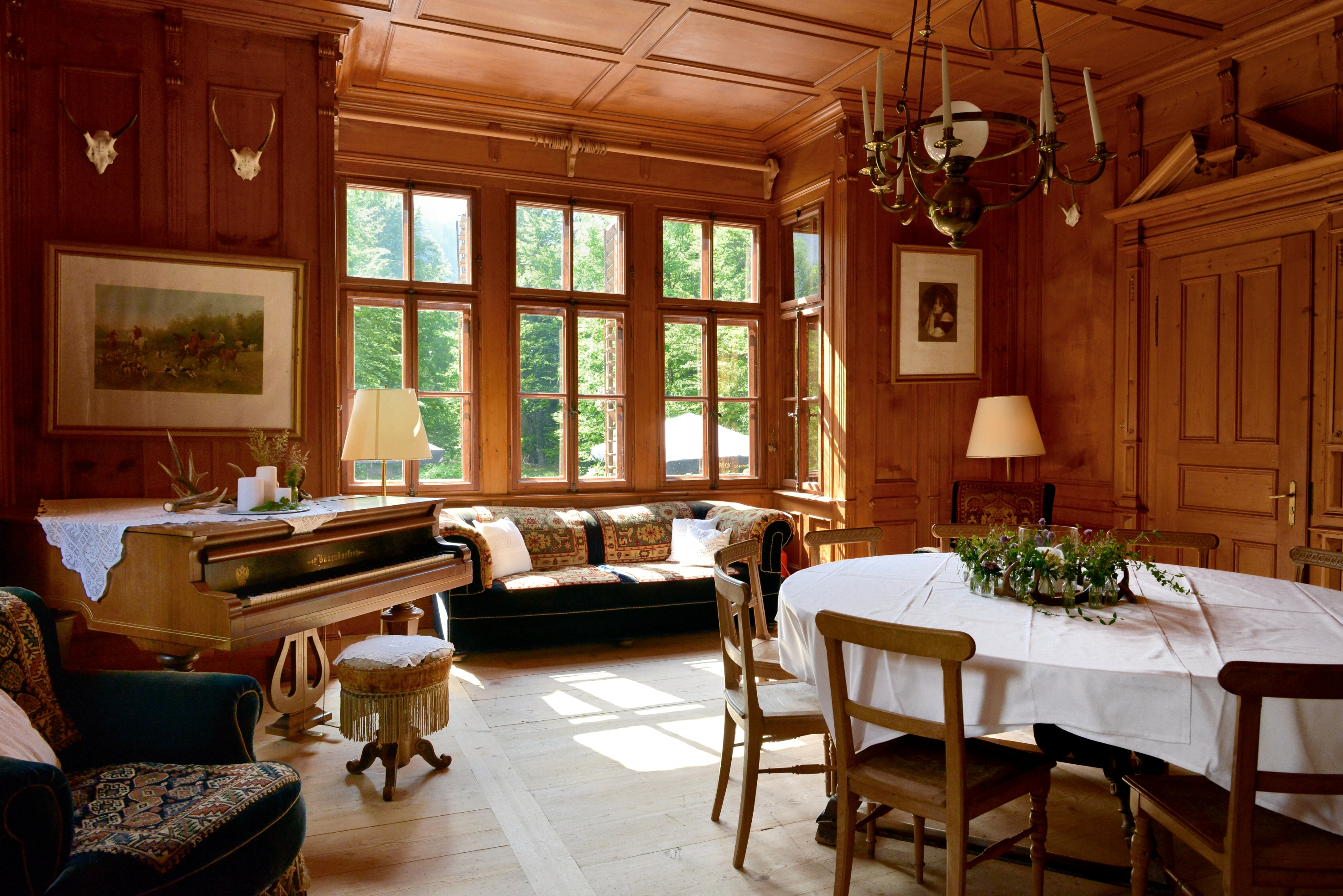 Die Villa Maund wurde 1895 als Jagdvilla im englischen Landhausstil vom Bankier Sir John Oakley Maund, auf dem Ausläufer der Ünschenberg Alp bei Hinterhopfreben erbaut. Im Bild das Herrenzimmer.